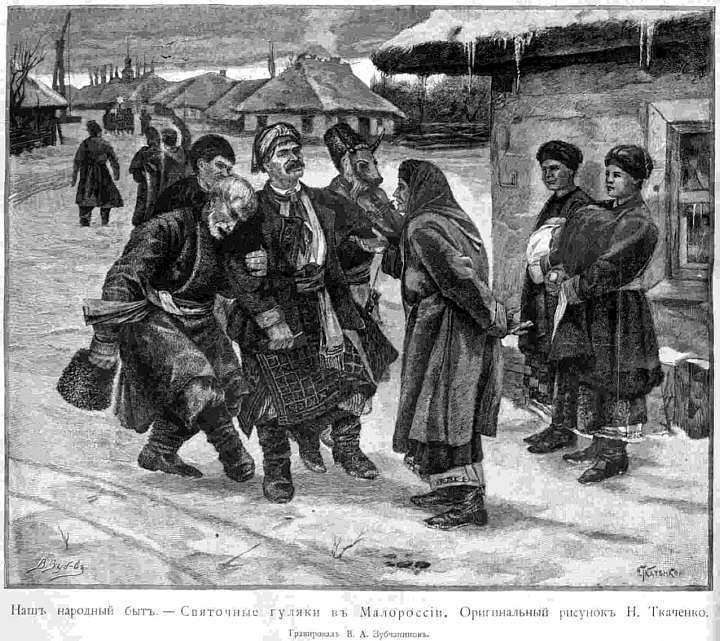 Обряд «Вождение Маланки». Рисунок «Святочные гуляки в Малороссии». От Рождества и до Крещения – Святки, время гуляний и гаданий. "Всемирная иллюстрация", №1, 1894.